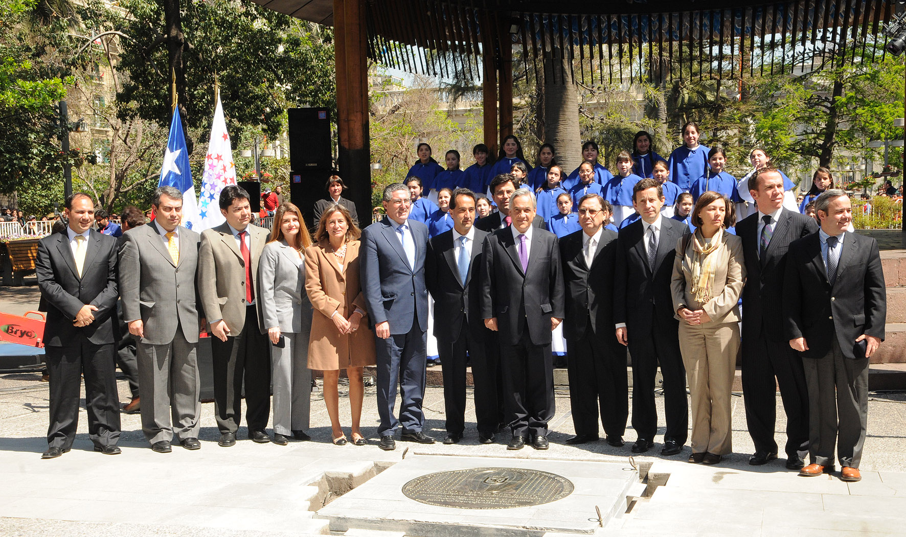 El Presidente de la República participa del cierre de la Cápsula del Bicentenario, en la Plaza de Armas de Santiago.